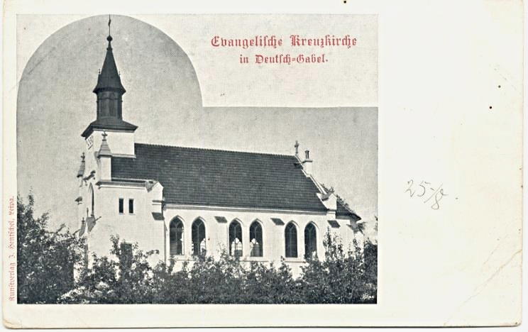 Pohlednice s evangelickým kostelem v Jablonném